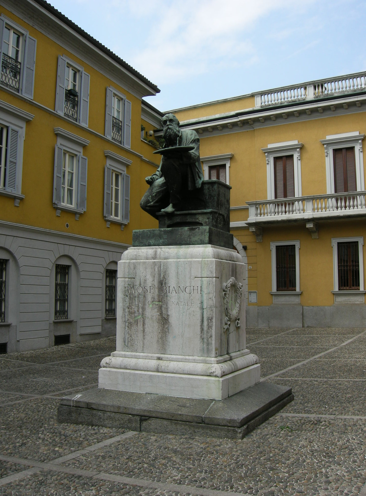 Monumento a mosè bianchi, monza